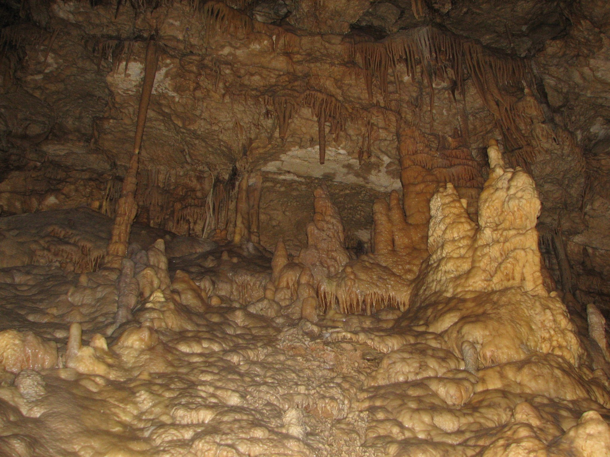 В Новоафонской пещере